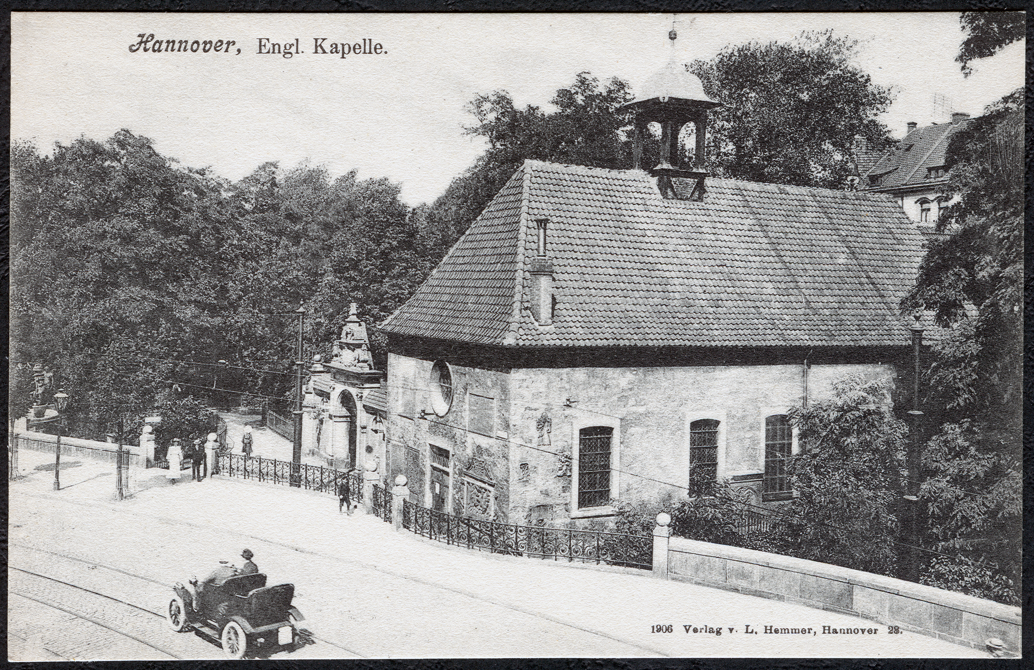 Ansichtskarte Nummer "28" von Hemmer von 1906; zu sehen ist die Englische Kapelle , heute als Nikolaikapelle das älteste (teil-)erhaltene Gebäude der Stadt Hannover. Sie wurde bis zum Ersten Weltkrieg von der englischen Gemeinde in Hannover als Gotteshaus genutzt. Am Bildrand links ist schwach das Hölty-Denkmal zu erkennen, parallel zu den Straßenbahn-Gleisen entlang der (heutigen) Straße Goseriede fährt eines offenes Automobil. An die Kapelle angebaut ist das Tor der ehemaligen Denkmal-Halle. Im Jahr 2011 führte die Goseriede noch direkt über das Gelände der ehemaligen Kapelle und des Friedhofs.